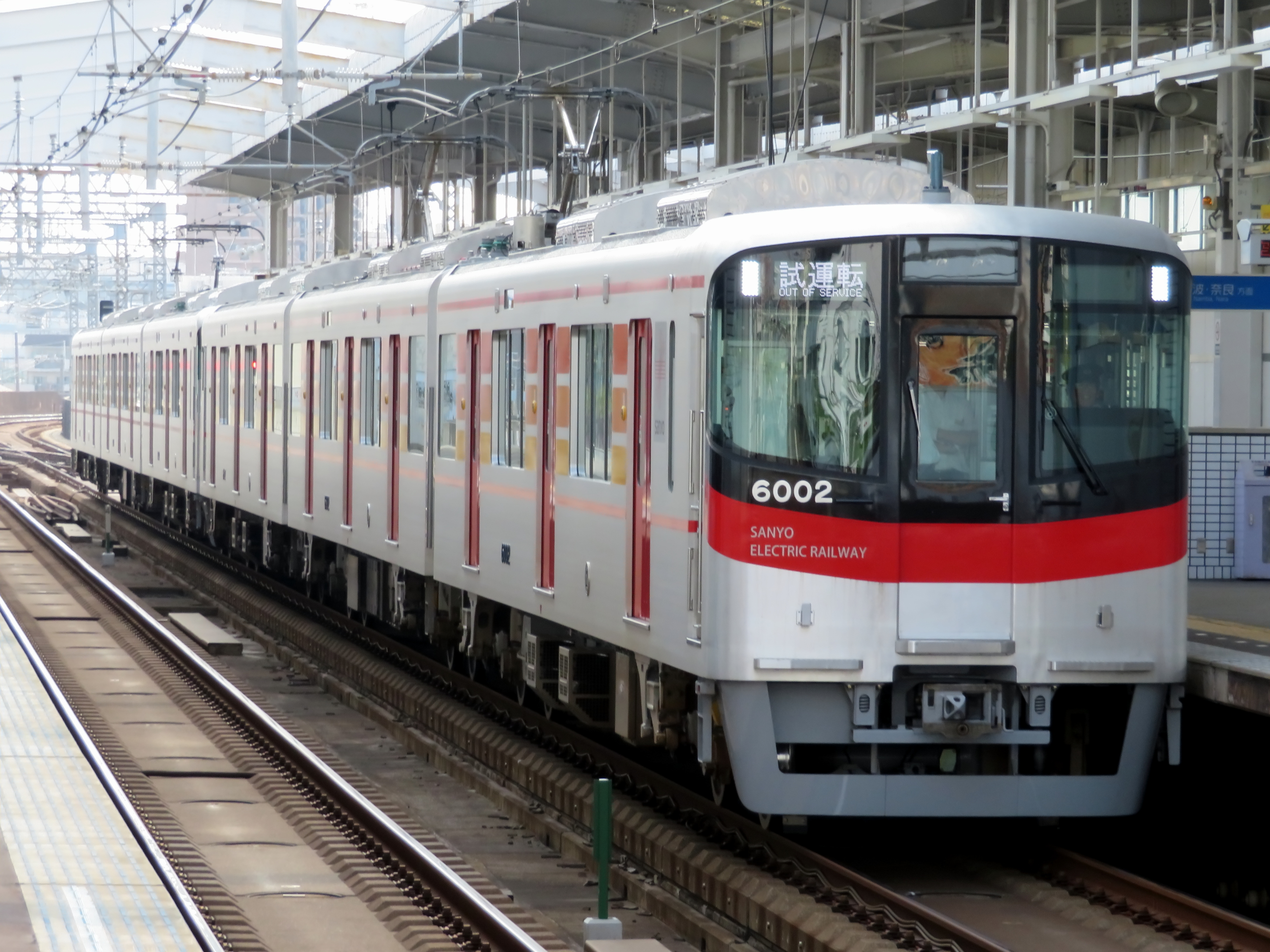 山陽6000系 阪神線試運転 尼崎センタープール前